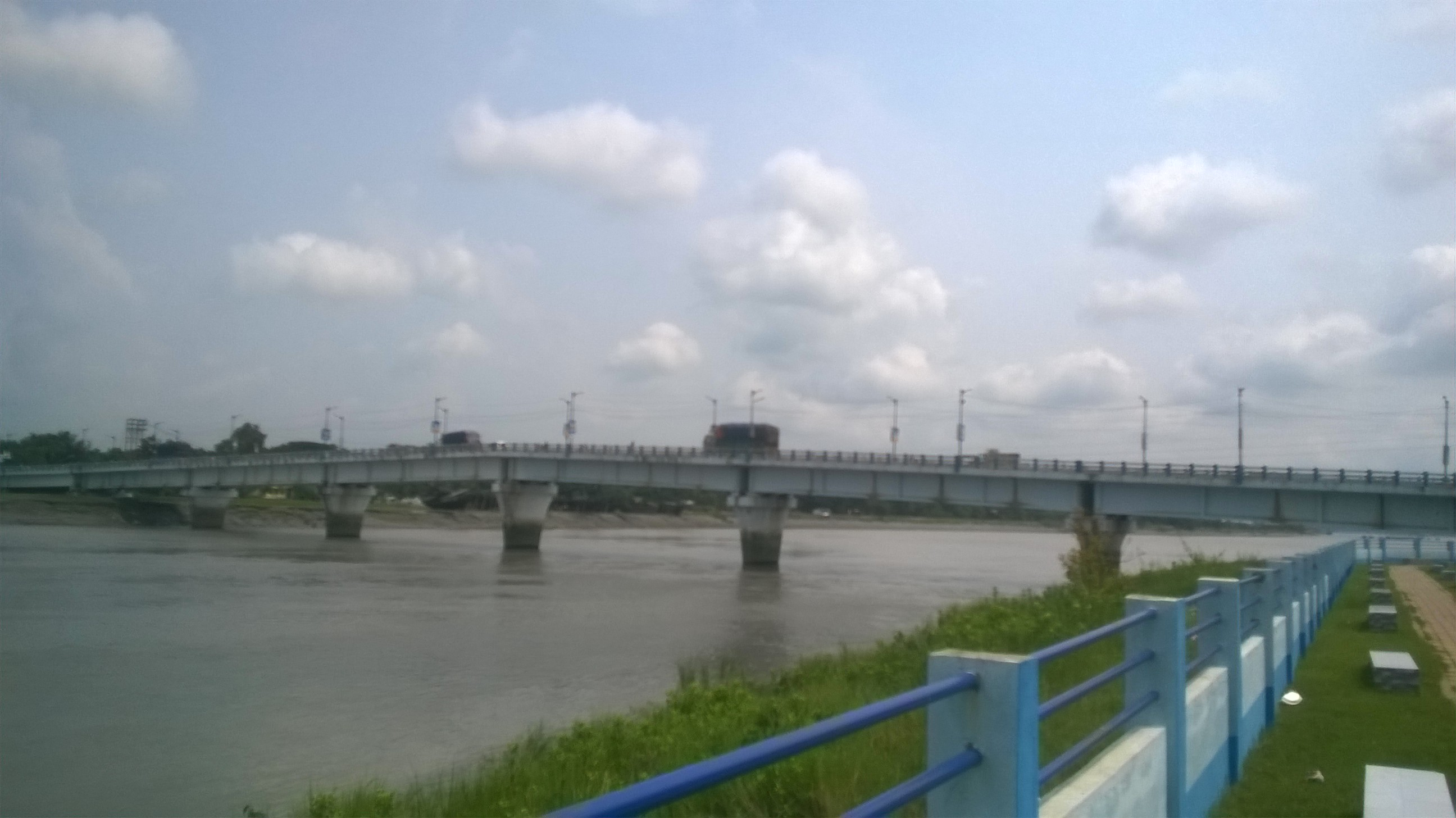 বসিরহাট সেতু (Basirhat Bridge from Rabindra saikat park)